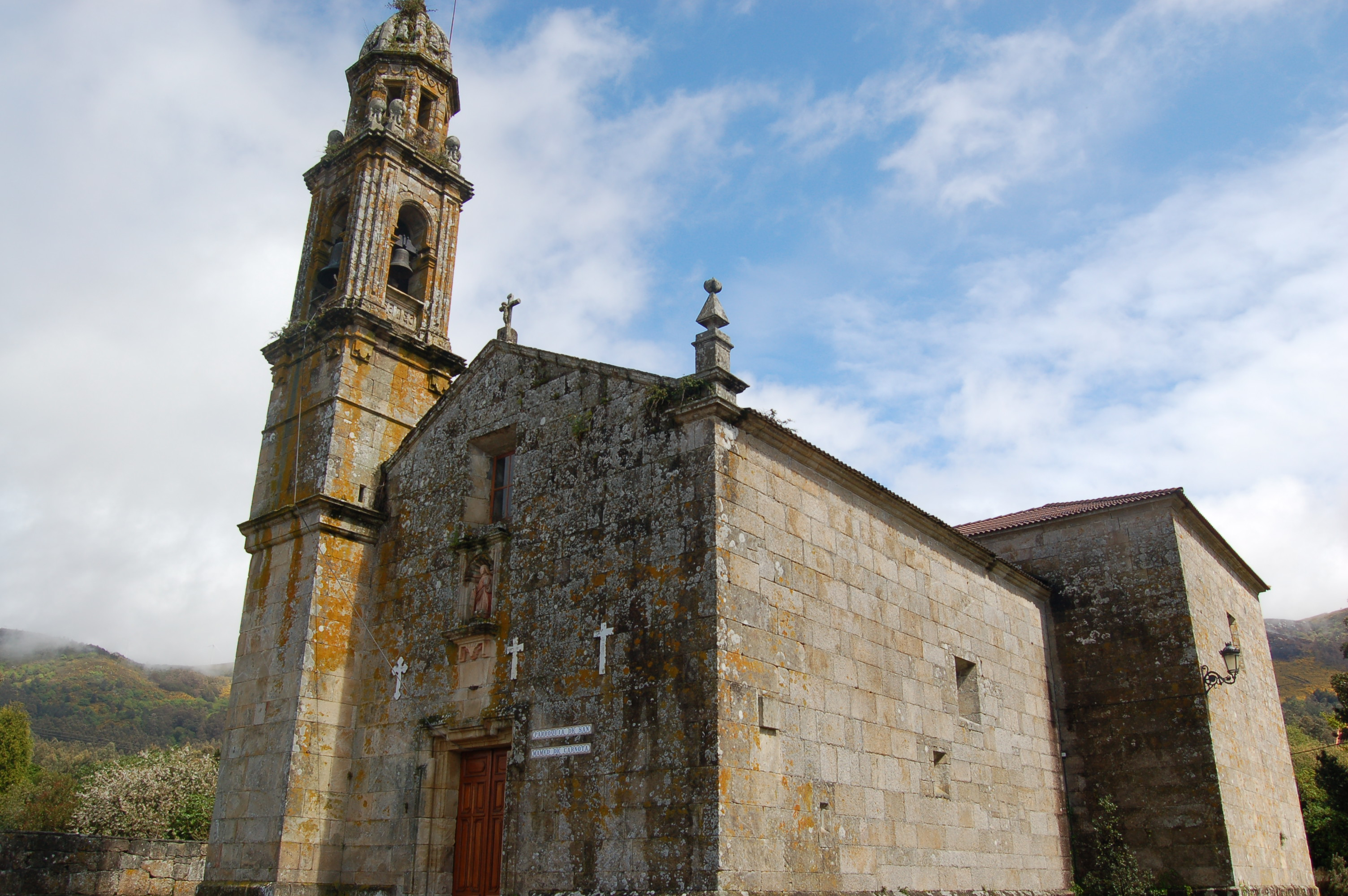 Igrexa parroquial de San Mamede de Carnota (Carnota).